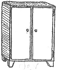 Der Schrank